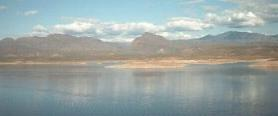 Roosevelt Lake, Arizona